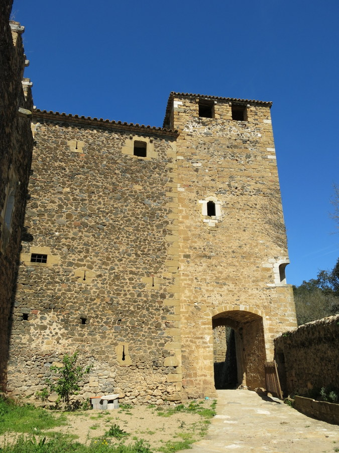 castell de Cartellà (Sant Gregori) a la comarca del Gironès